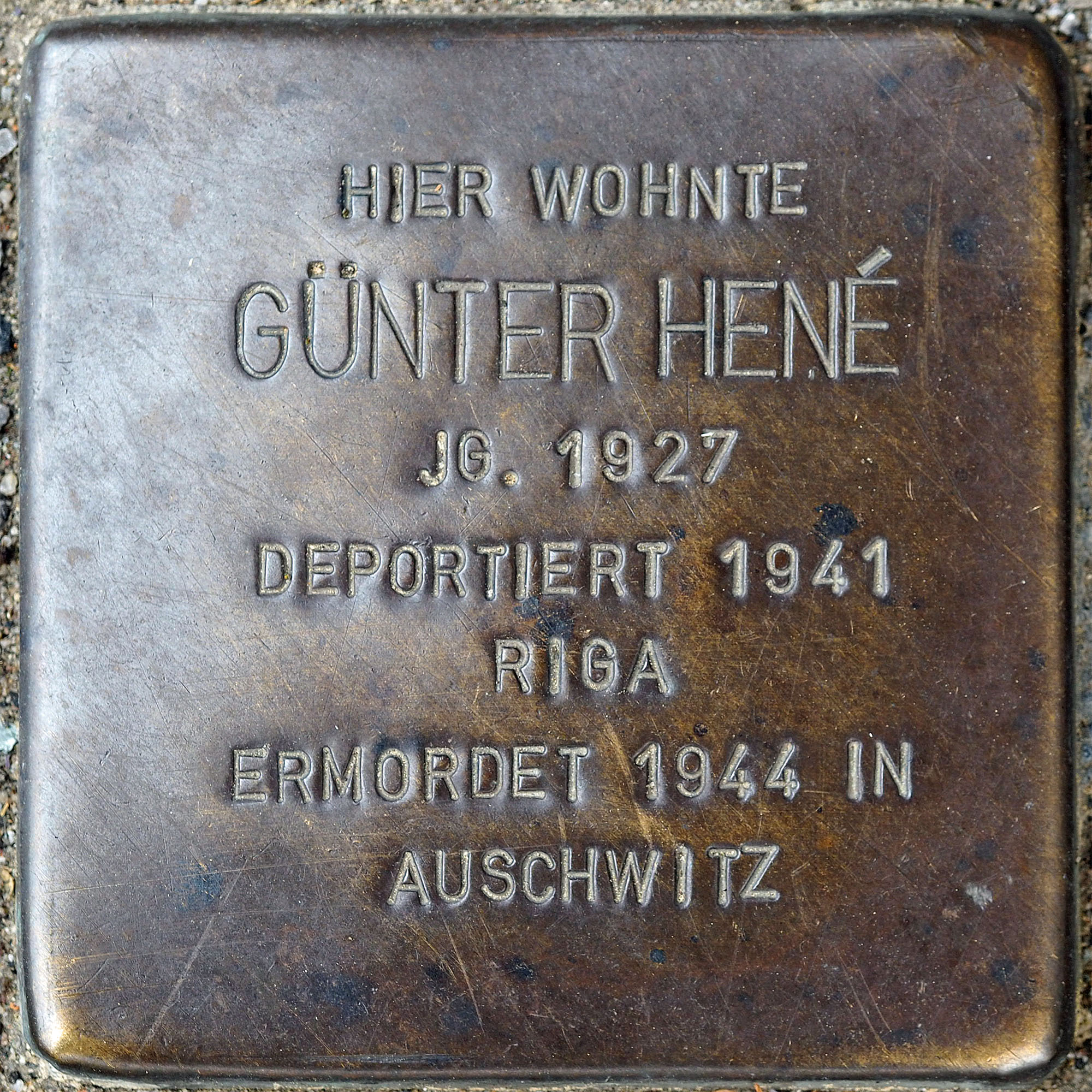 Stolpersteine MG: Hene, Günter